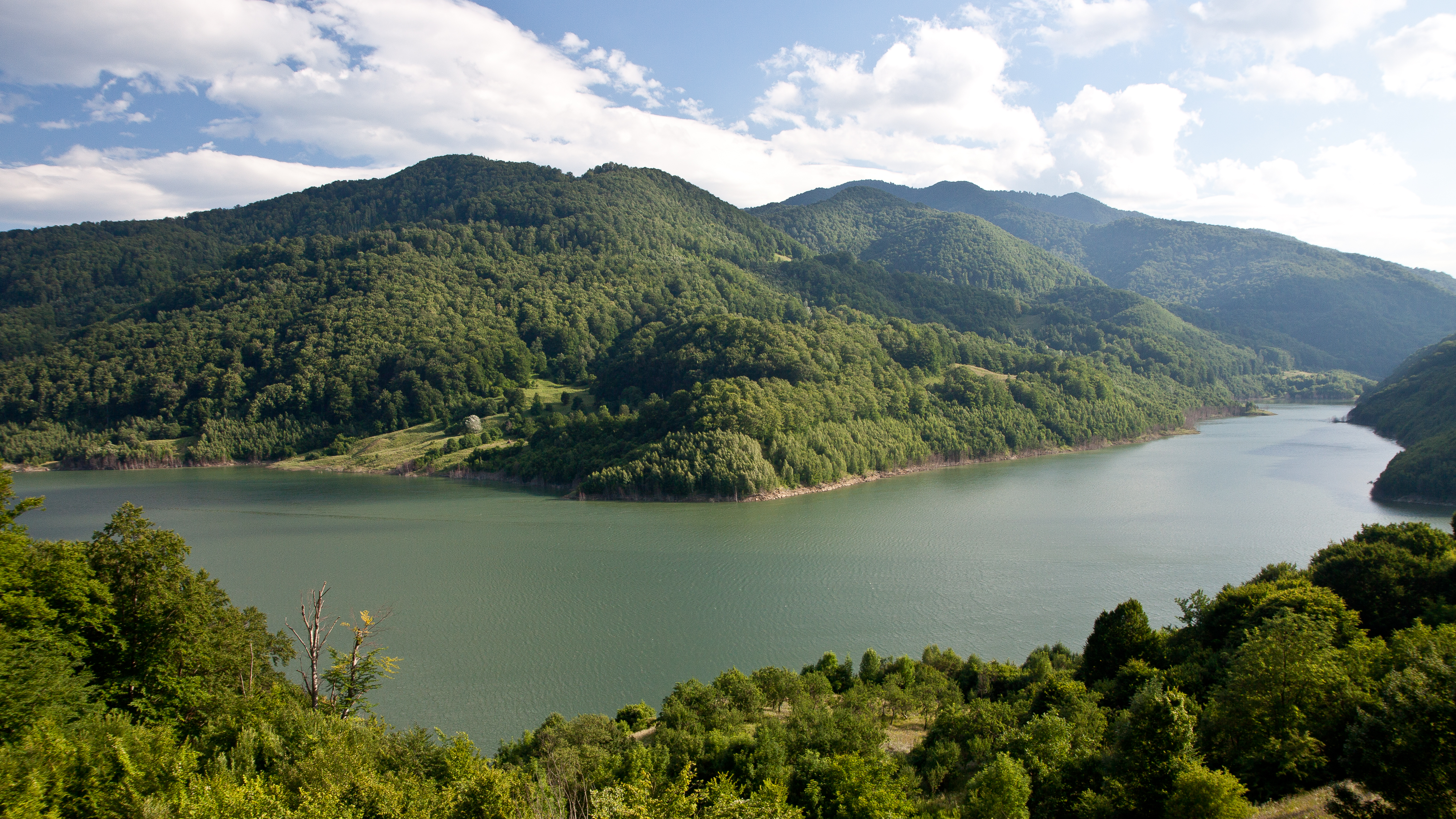 Siriu Lake